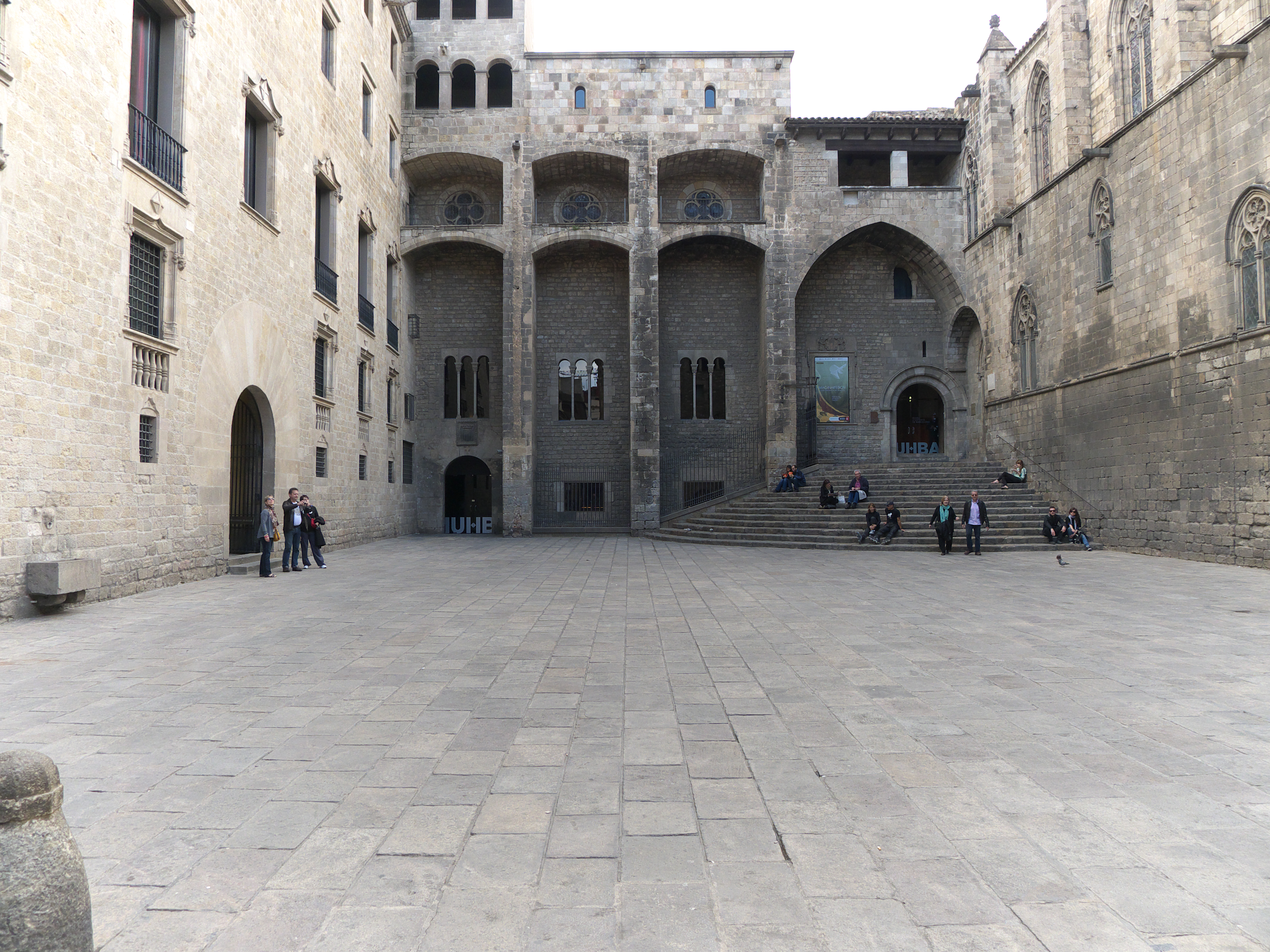 Barcelona gótica. Muestra de importantes edificios, residencia del Condado de Barcelona y de la Corona de Aragón.